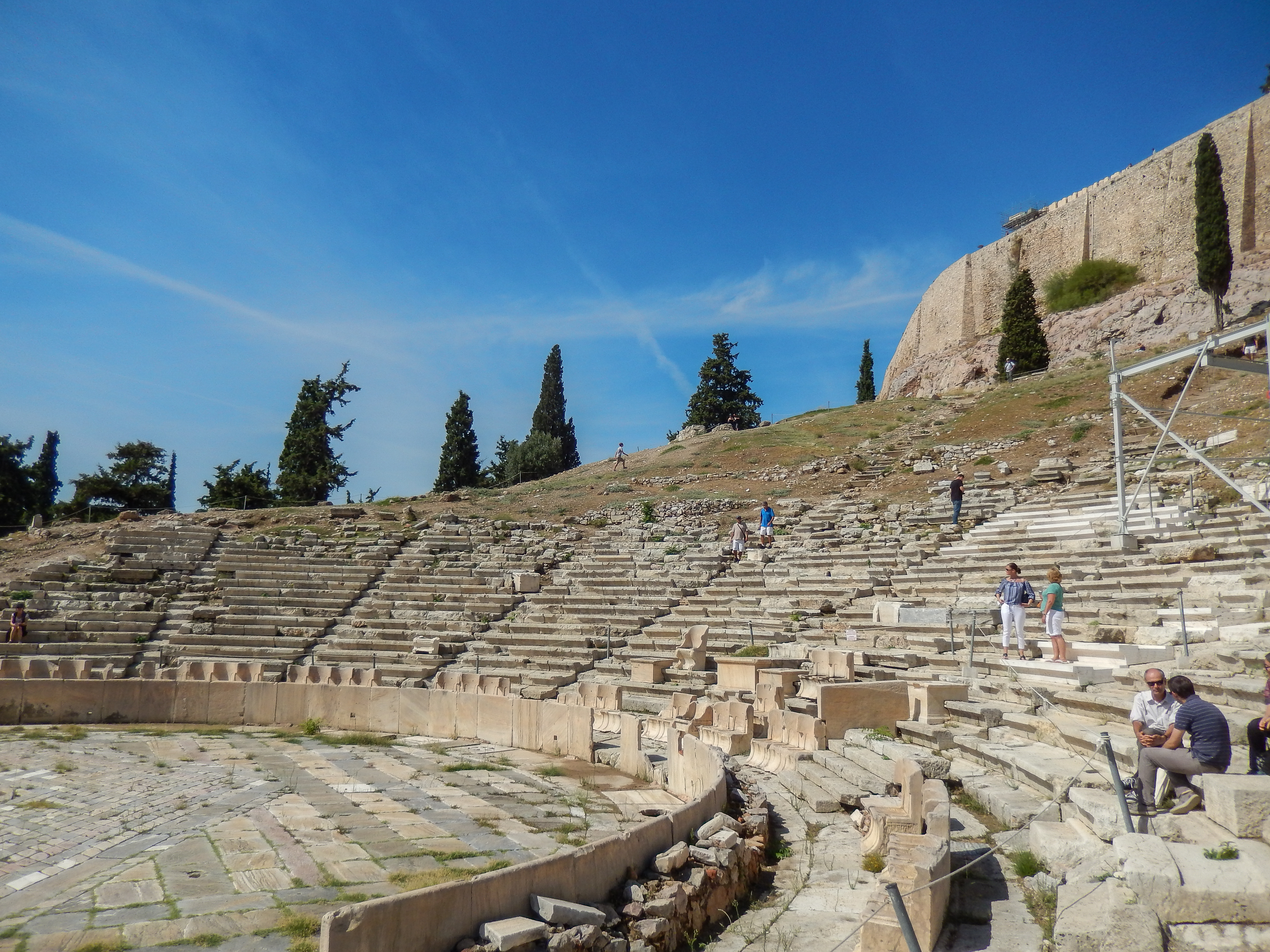 Im Dionysostheater, Athen. Blick nach Westen.